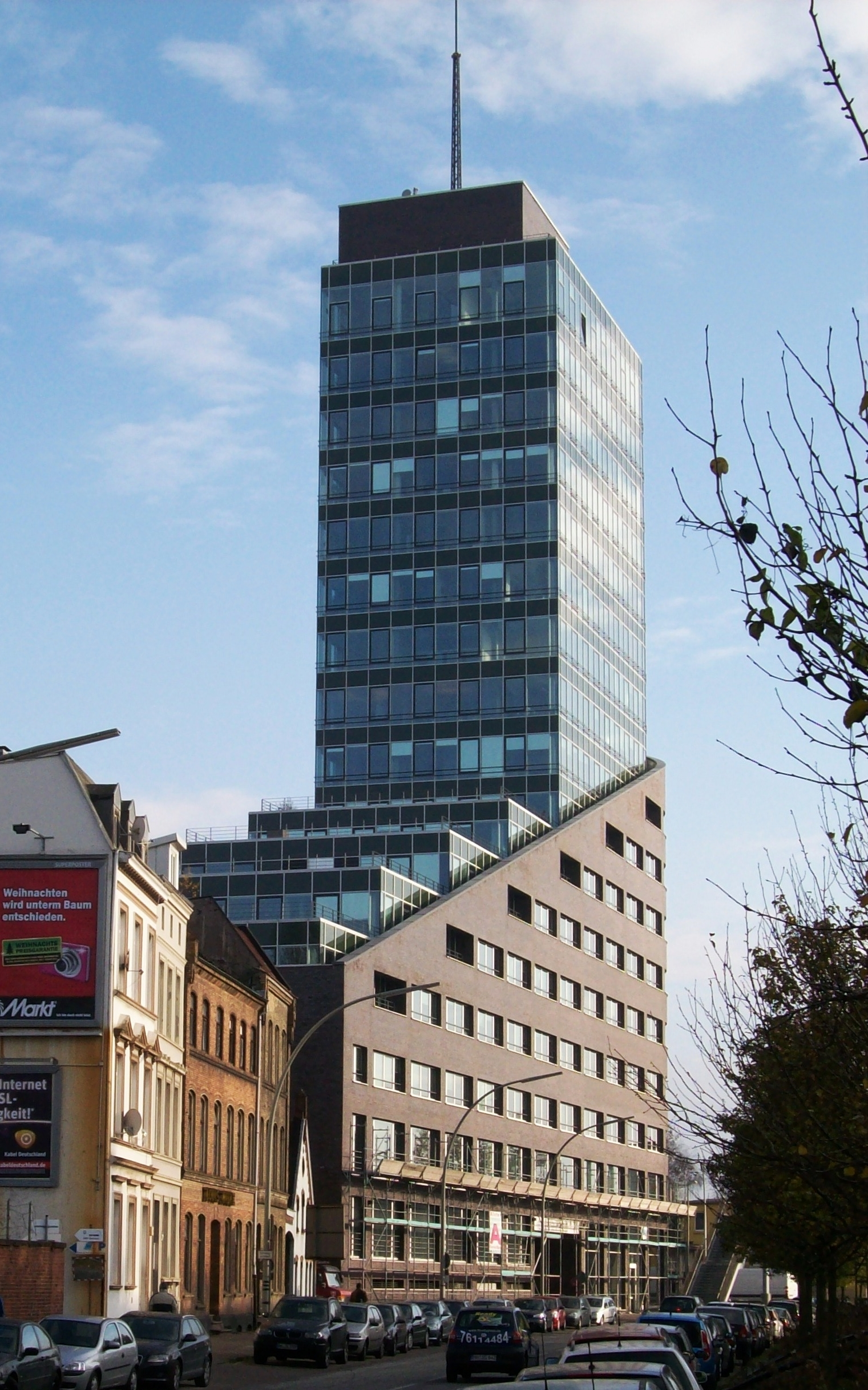 Harburg, Hamburg, Germany